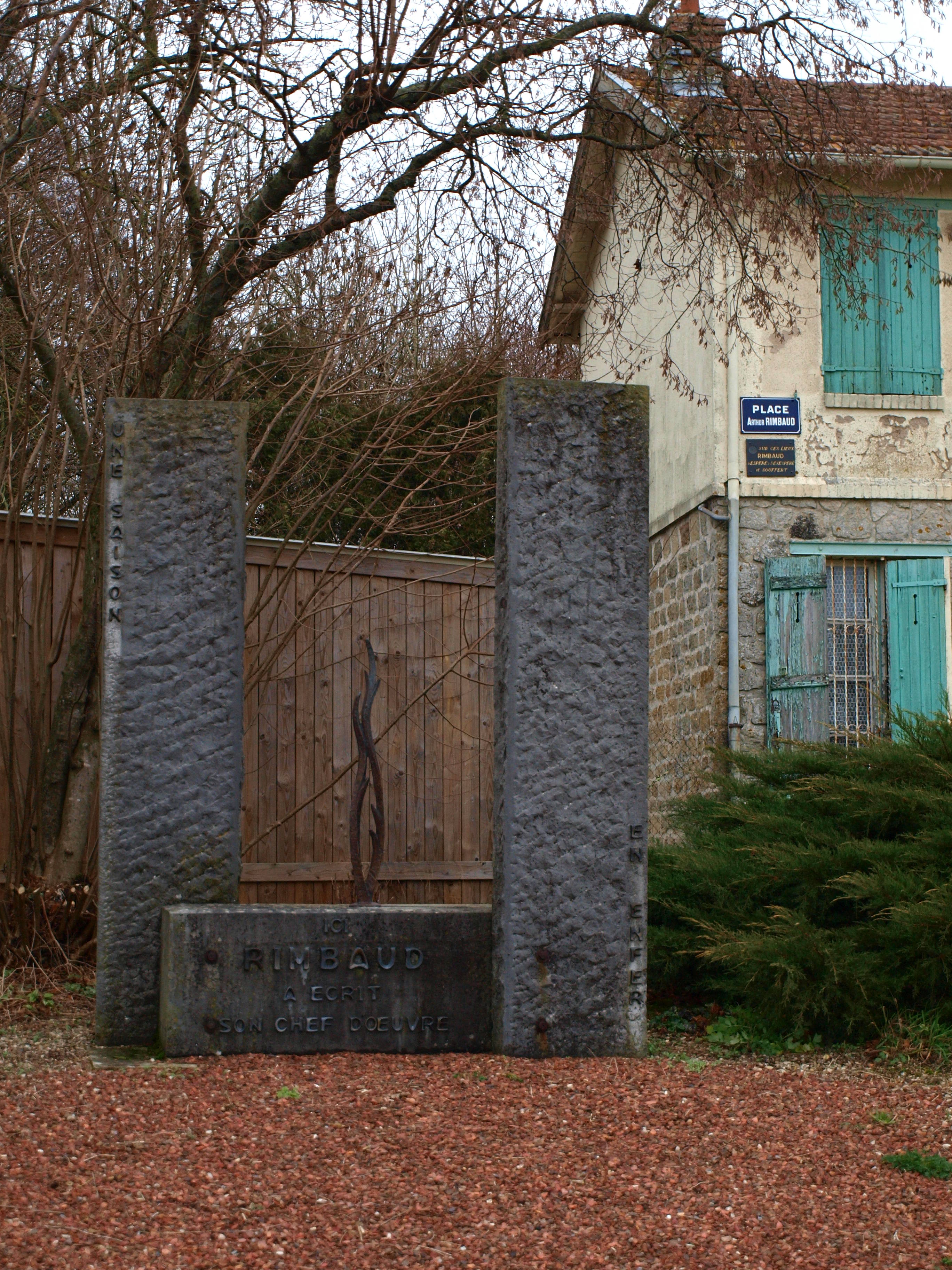 Chuffilly-Roche (Ardennes, France) ; hameau de Roche : monument qui marque l'endroit de la maison de la mère Rimb, maison dans laquelle fut rédigé Une Saison en Enfer.